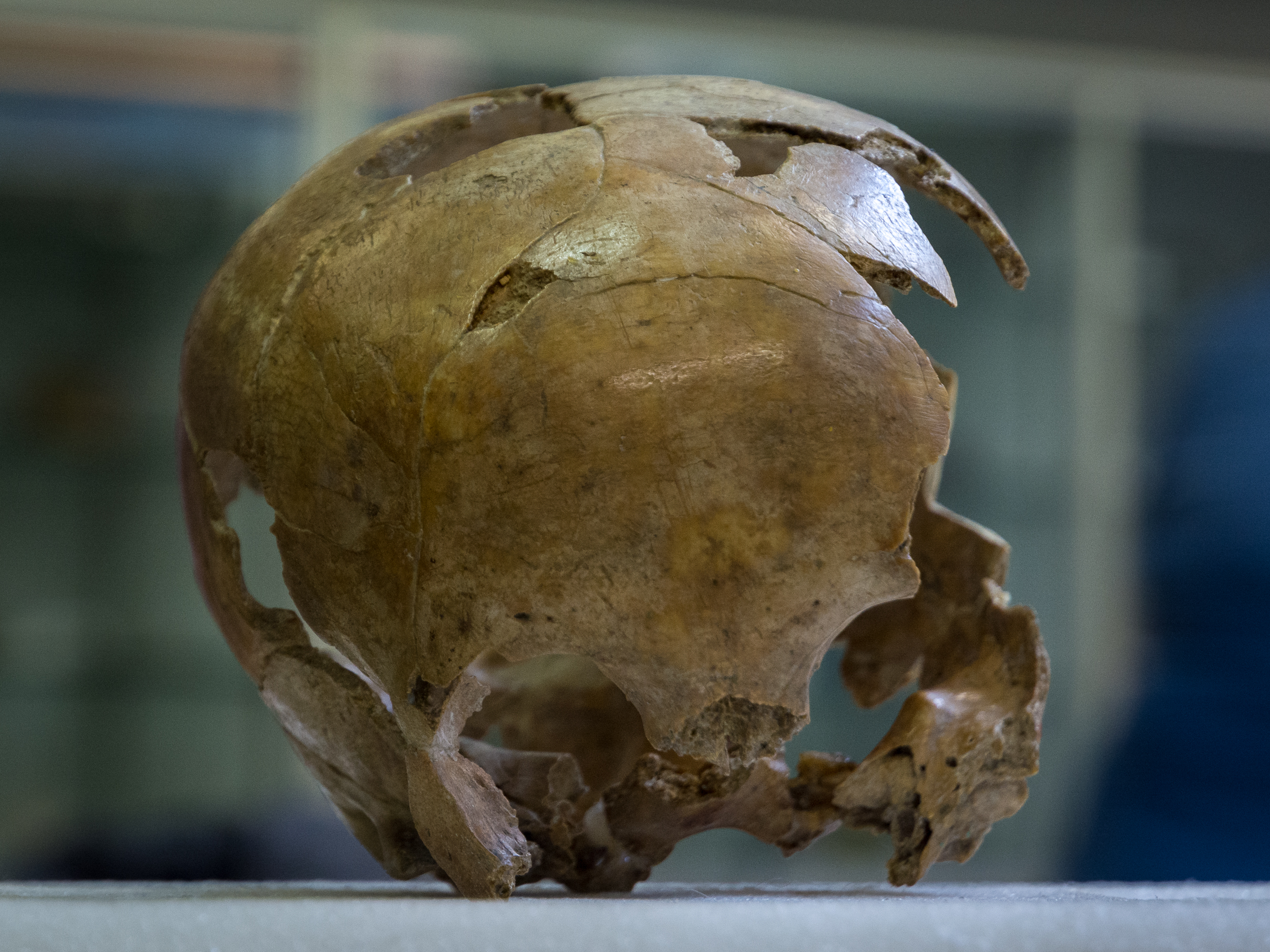 Engis 2 Schädel, Original, Universität Lüttich, Belgien.